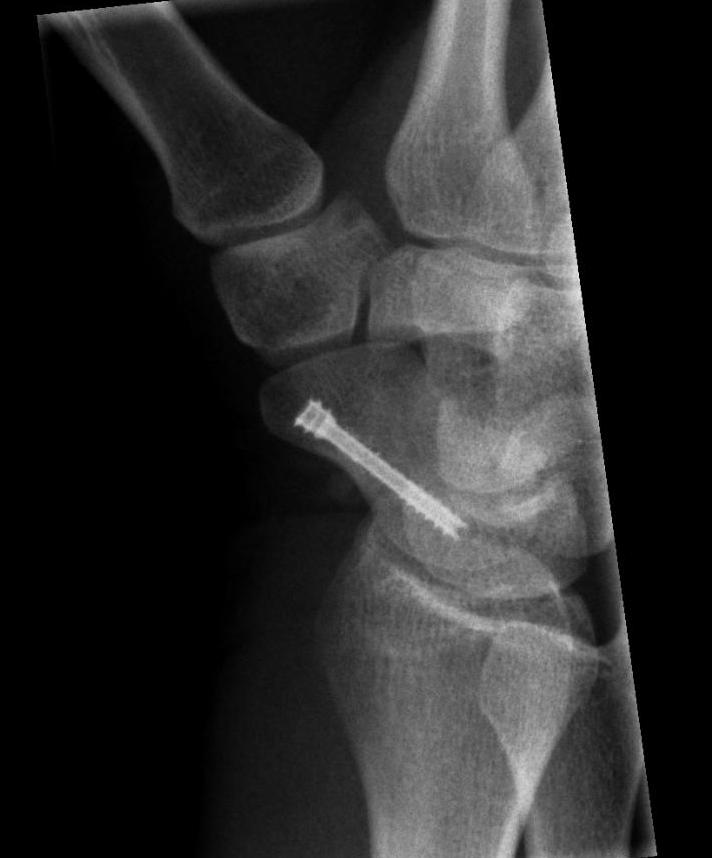 Röntgenbild einer Kahnbeinfraktur eines 20jährigen Patienten. Operative versorgung mit einer Boldschraube.